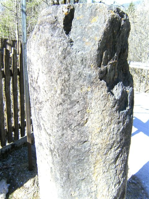 Grenzstein, Römerstein. Im Jahr 1703 plünderten bayrische Soldaten unser Dorf und schlugen die geschnitzte Figur des Kirchenpatrons des heiligen Nikolaus von seinem Sockel. Seit dieser Zeit steht der Meilenstein als „Mahnmal“ hier allein. Der Meilenstein befindet sich auf der Dorfstraße in Richtung Leithen bei einer Weggabelung rechts Richtung Meilerhof.